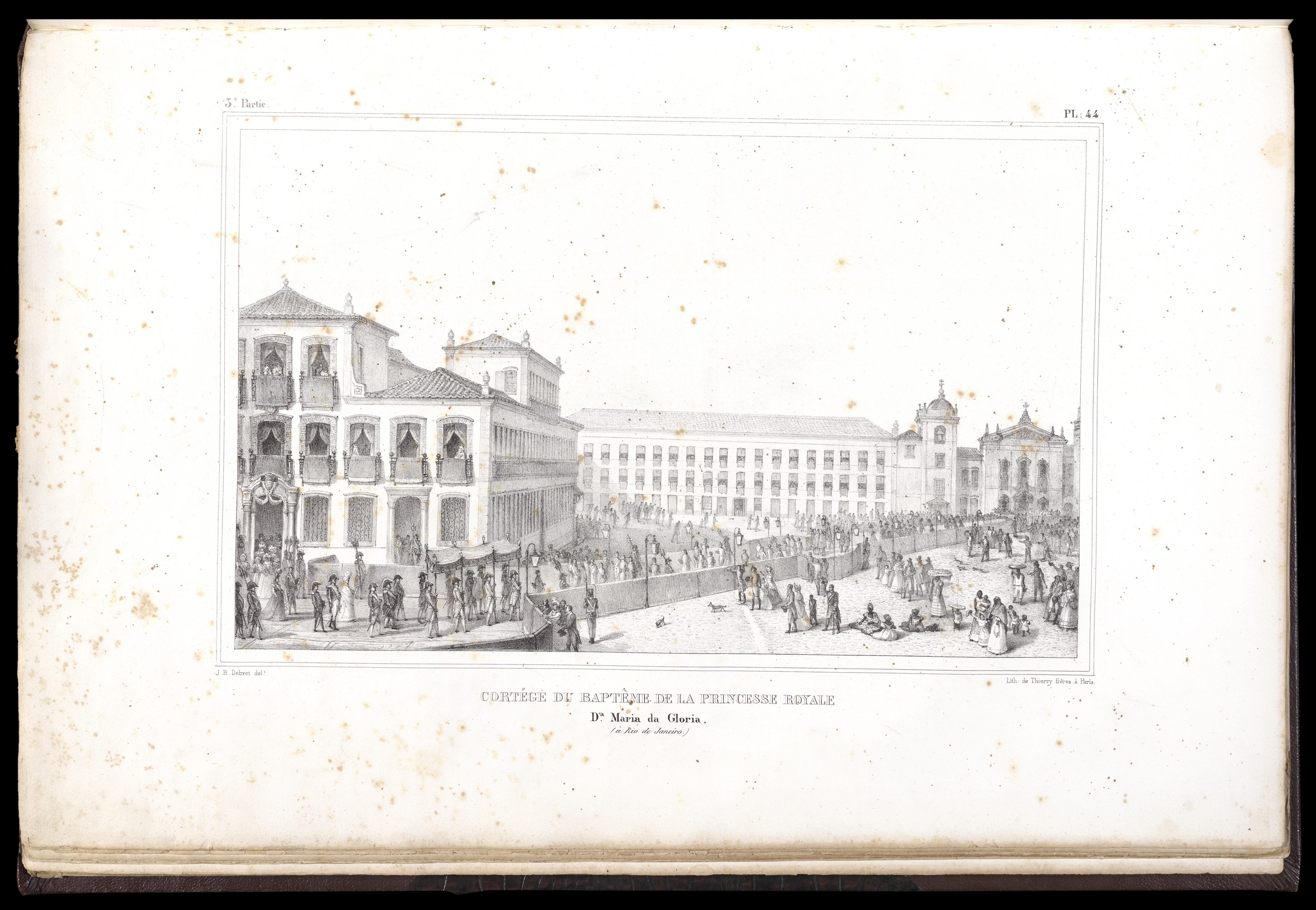 Obra da coleção Brasiliana Iconográfica.